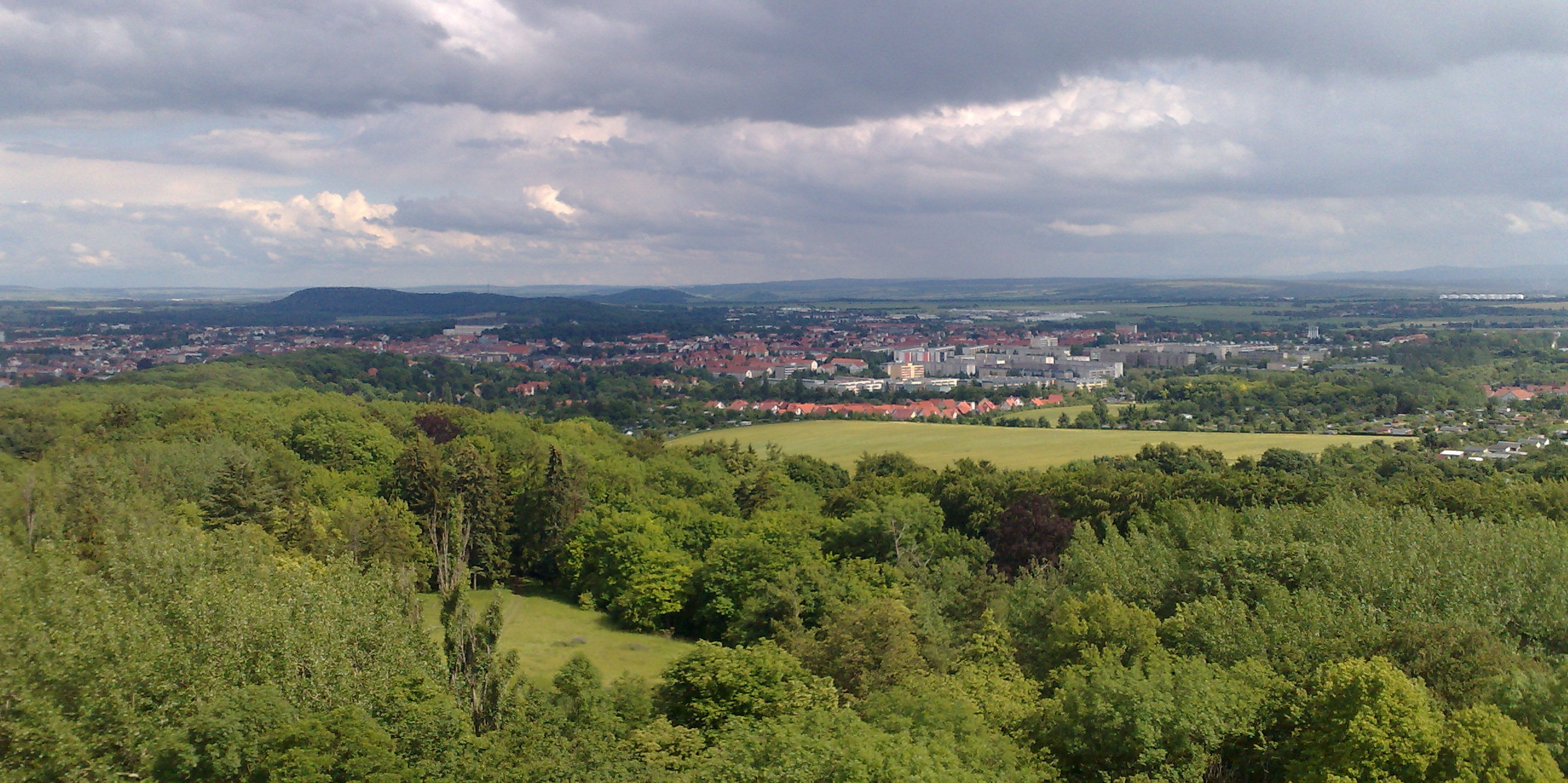 Gotha, Blick vom Bürgerturm